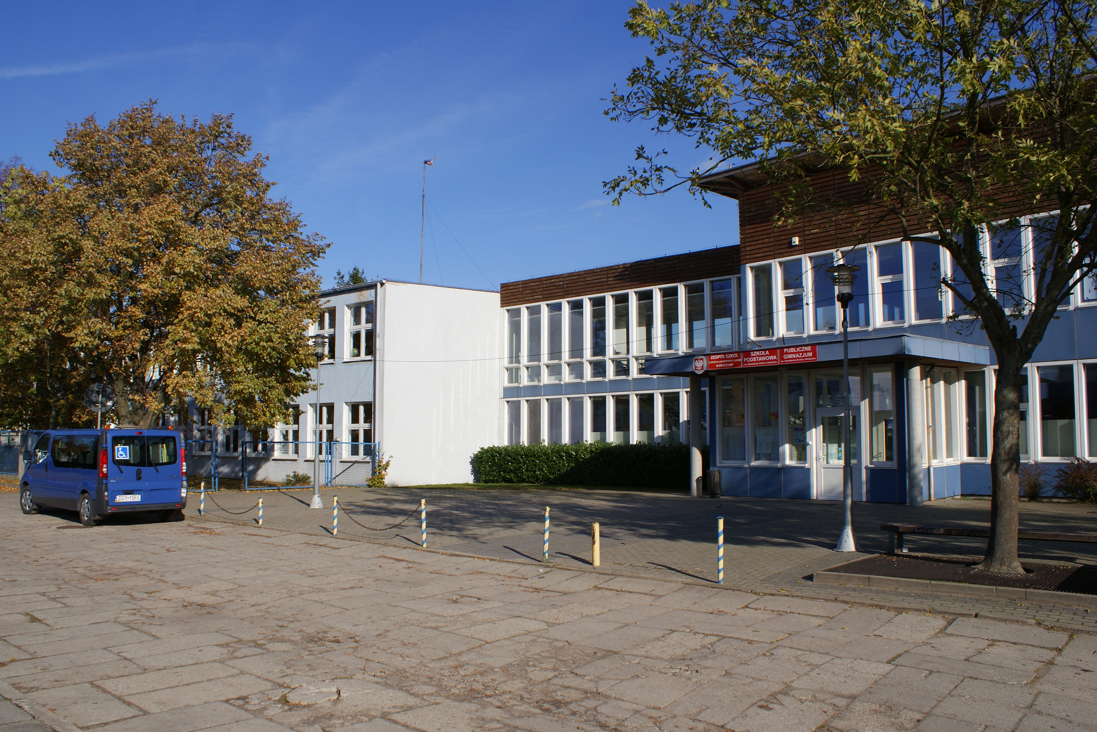 Wejście główne Zespołu Szkół im. Kawalerów Orderu Uśmiechu w Mrzeżynie